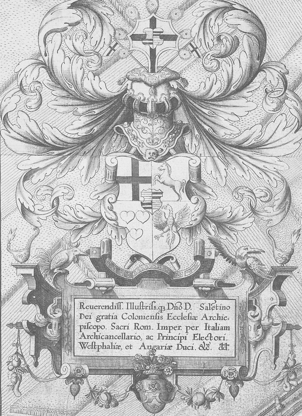 Wappen des Hauses Salentin von Isenburg. Ausschnitt des Mercator – Stadtplanes Köln, Detailzeichnungen